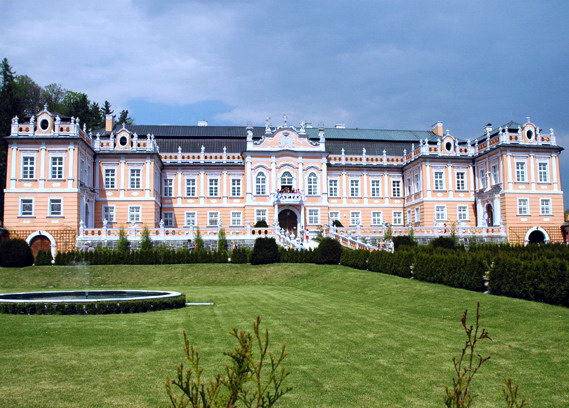 zámek Nové Hrady, průčelí